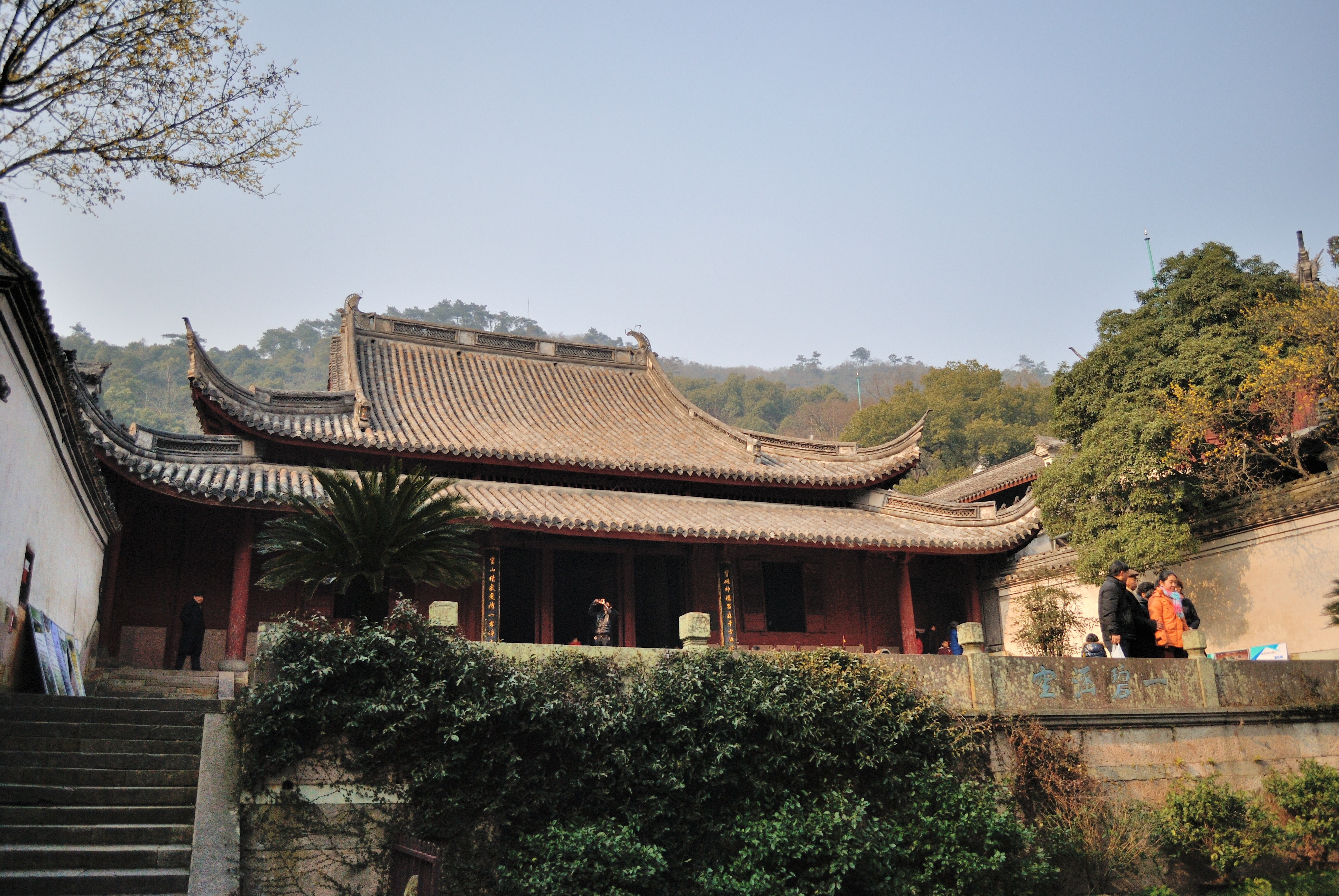 保国寺大雄宝殿